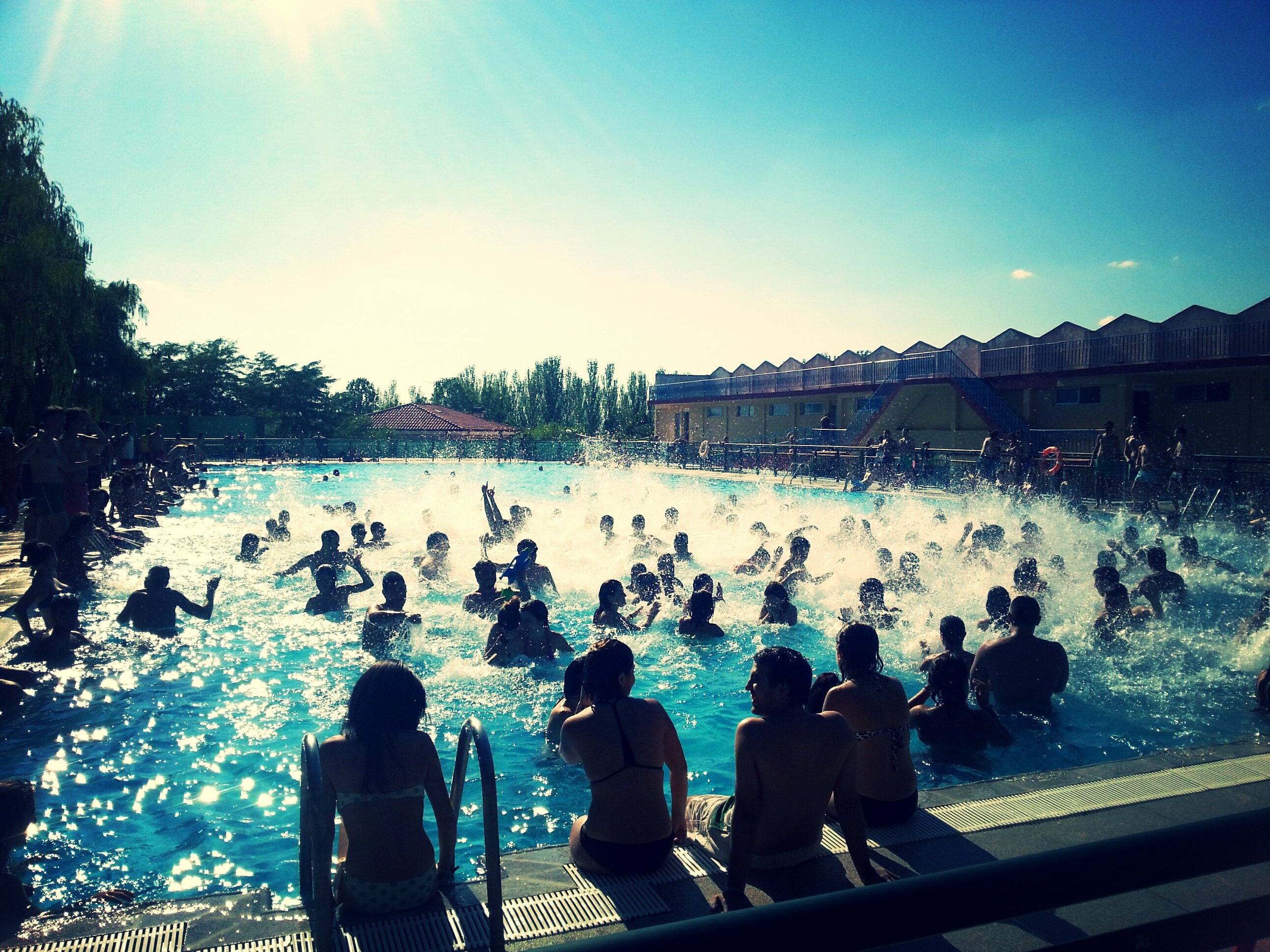 Piscina Acaculpo, durante el Festival Sonorama Ribera 2013, en Aranda de Duero (Burgos)